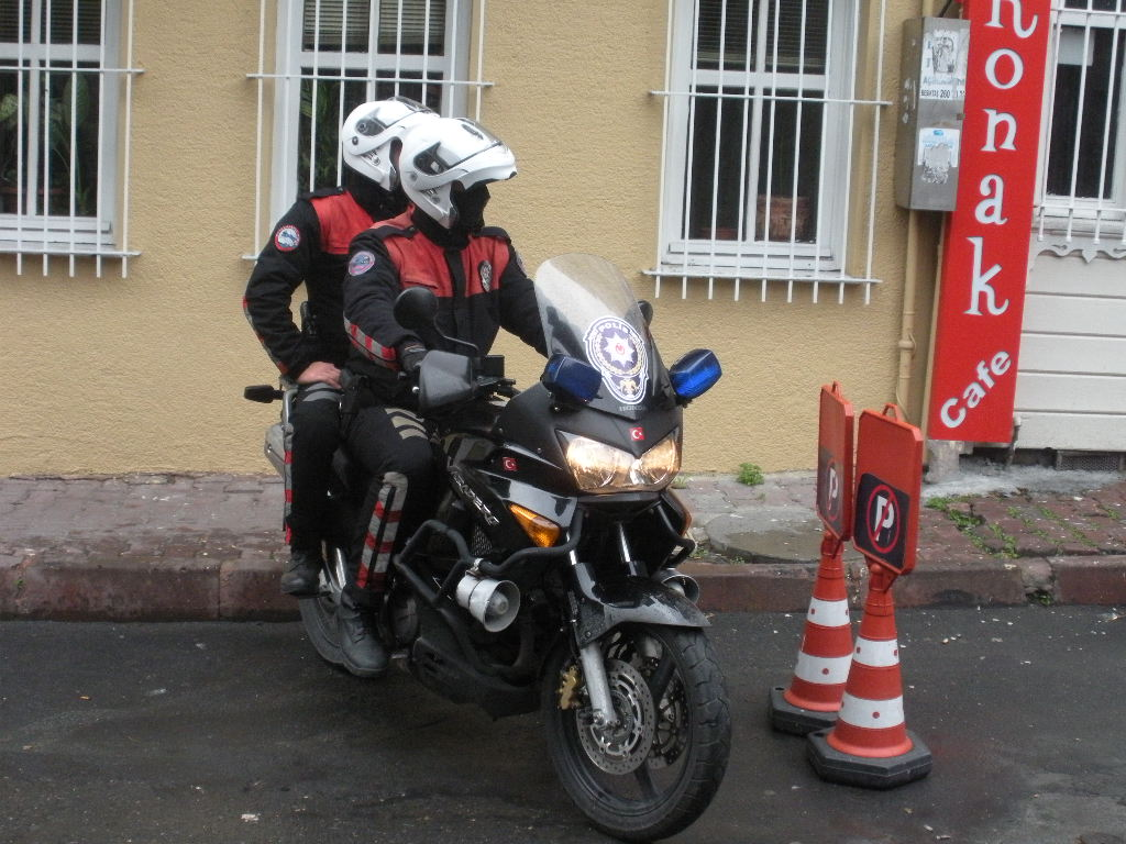 Istanbul Turkey